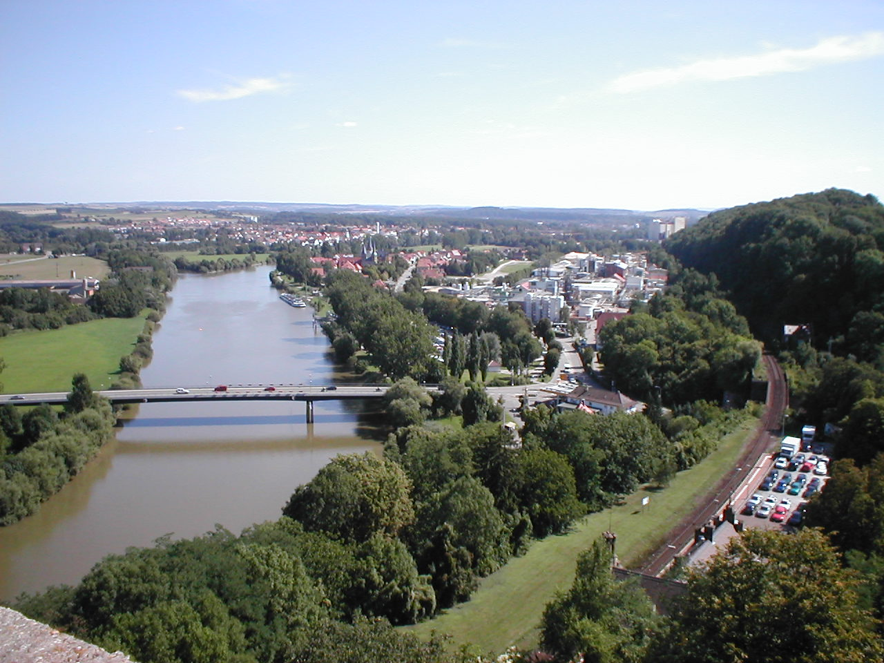 Bad Wimpfen, Blick vom Roten Turm neckaraufwärts über Wimpfen im Tal